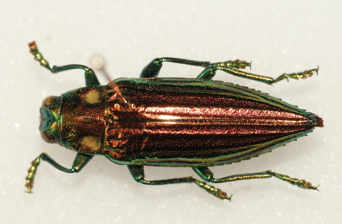 Buprestidae - In collection